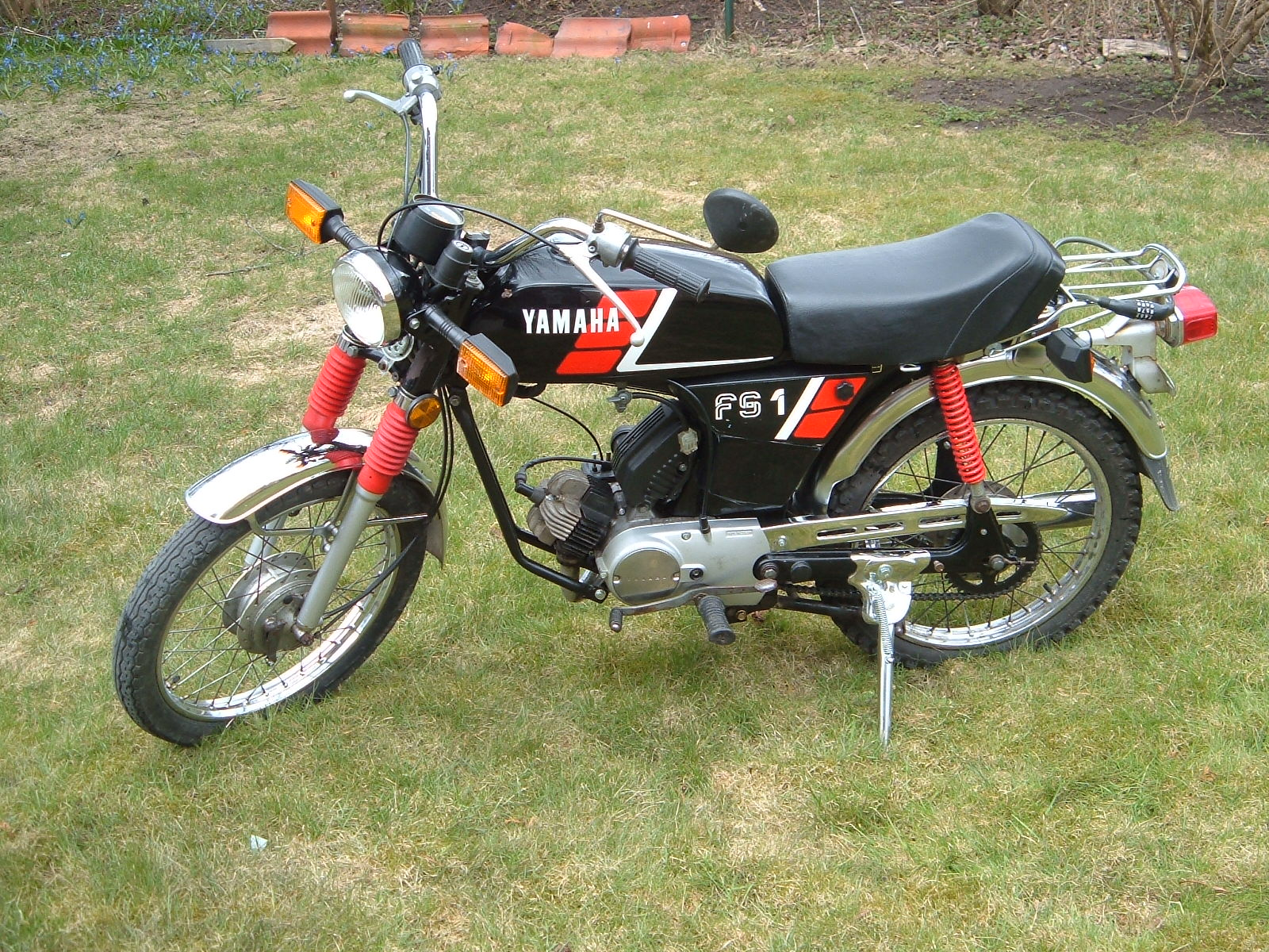 Yamaha FS1.